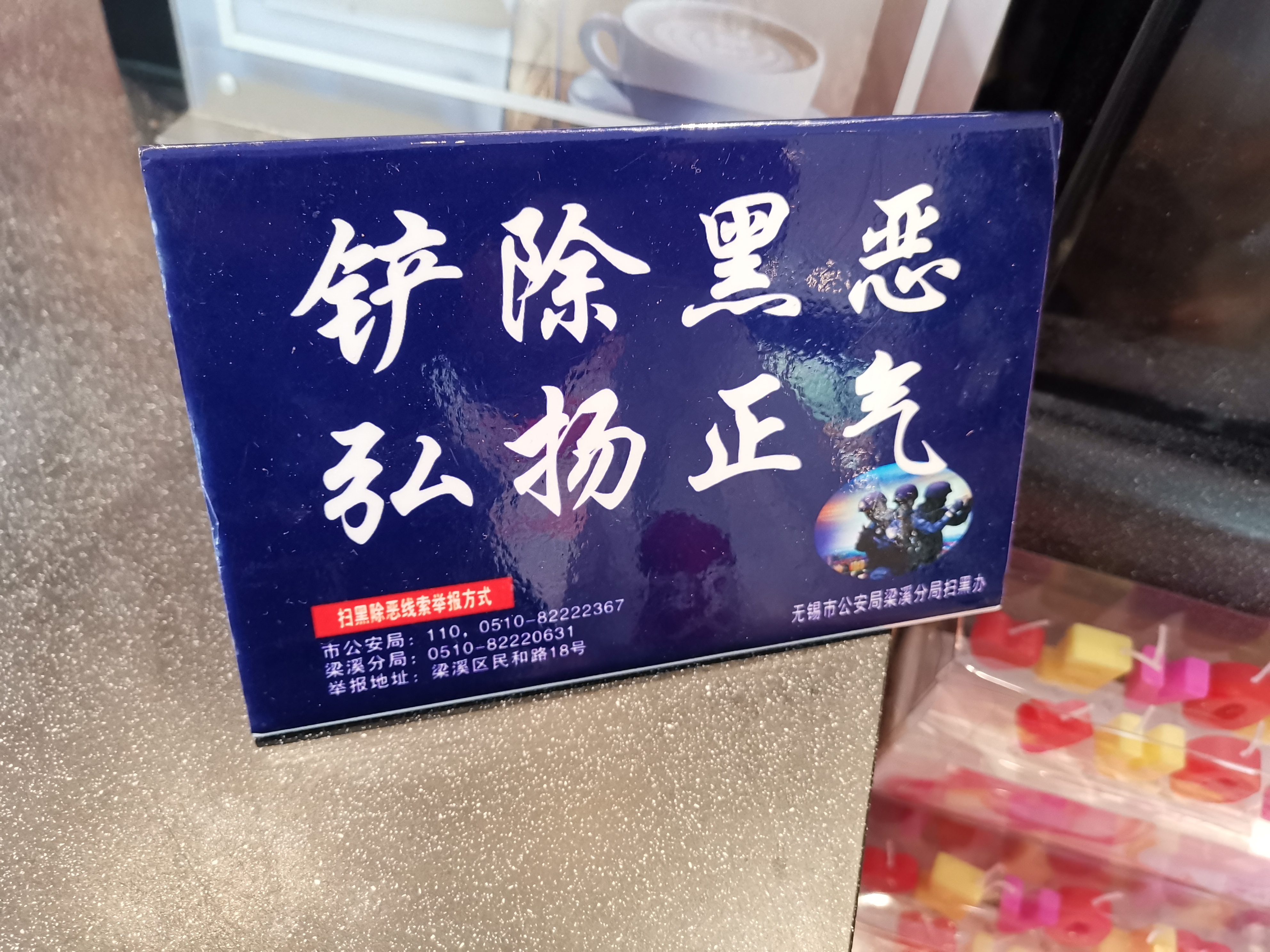 商城里面的扫黑除恶宣传 2019